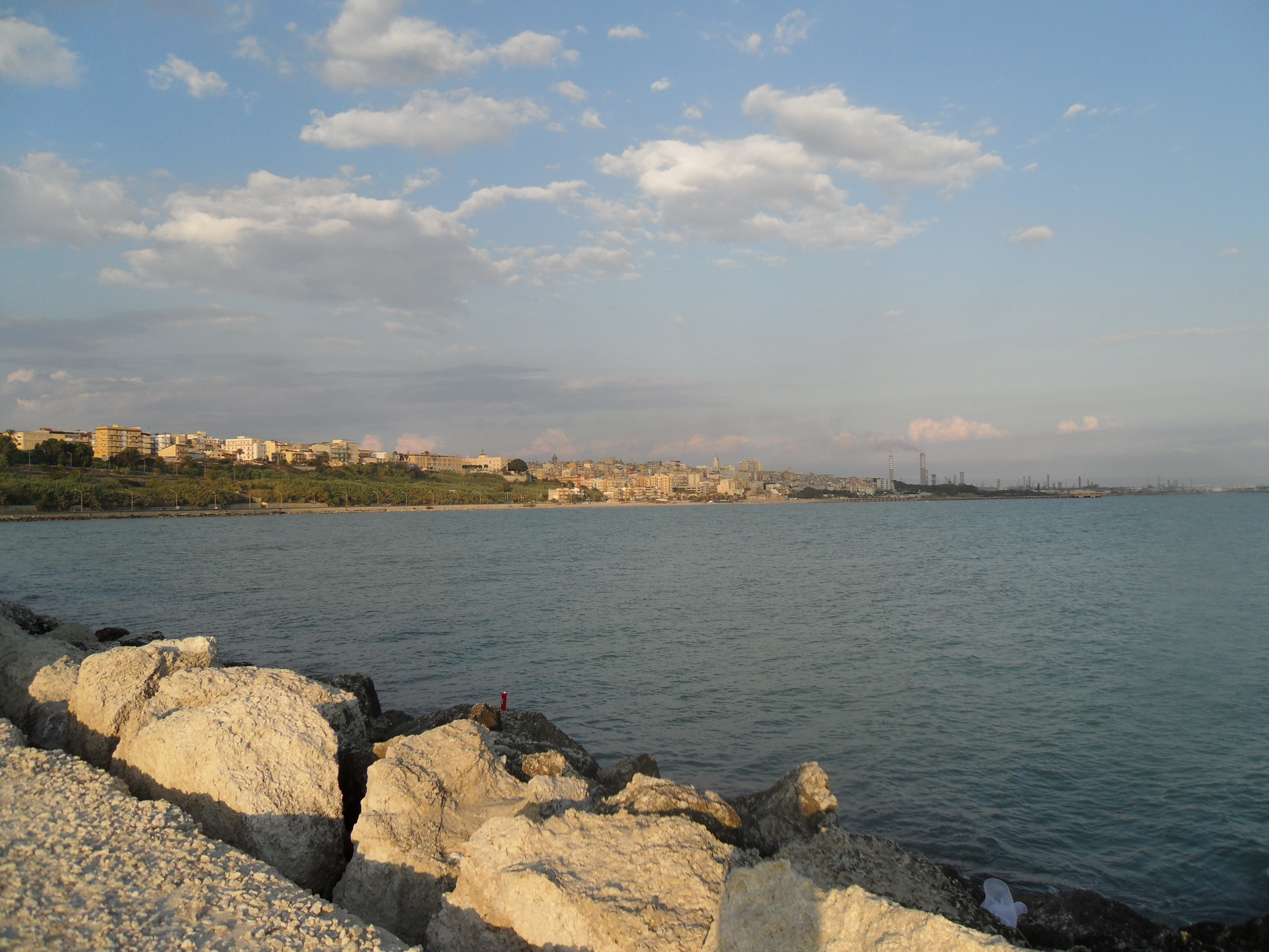 Gela, panorama dal Porto Rifugio.